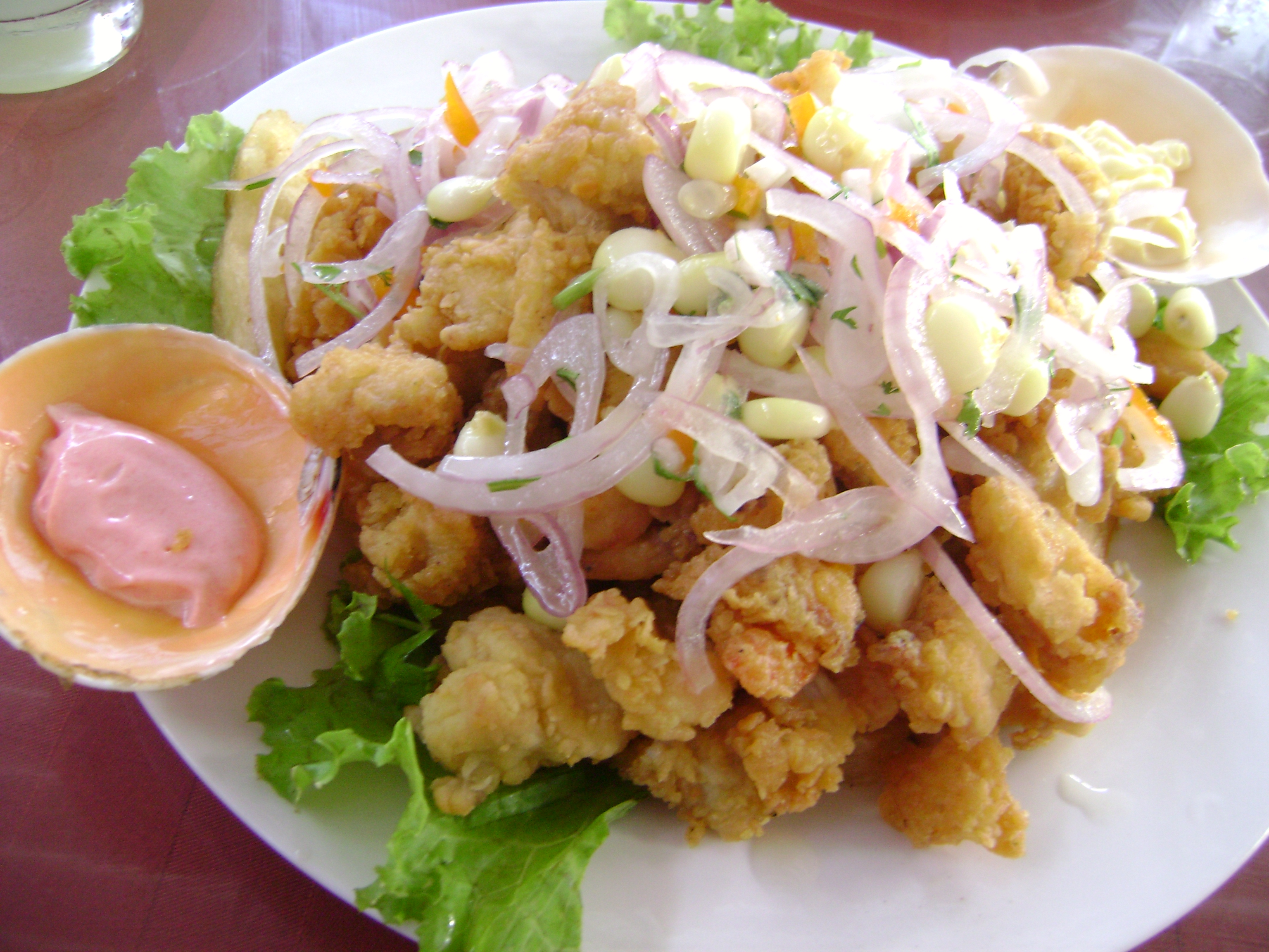 Jalea mixta. Chiclayo, Perú.